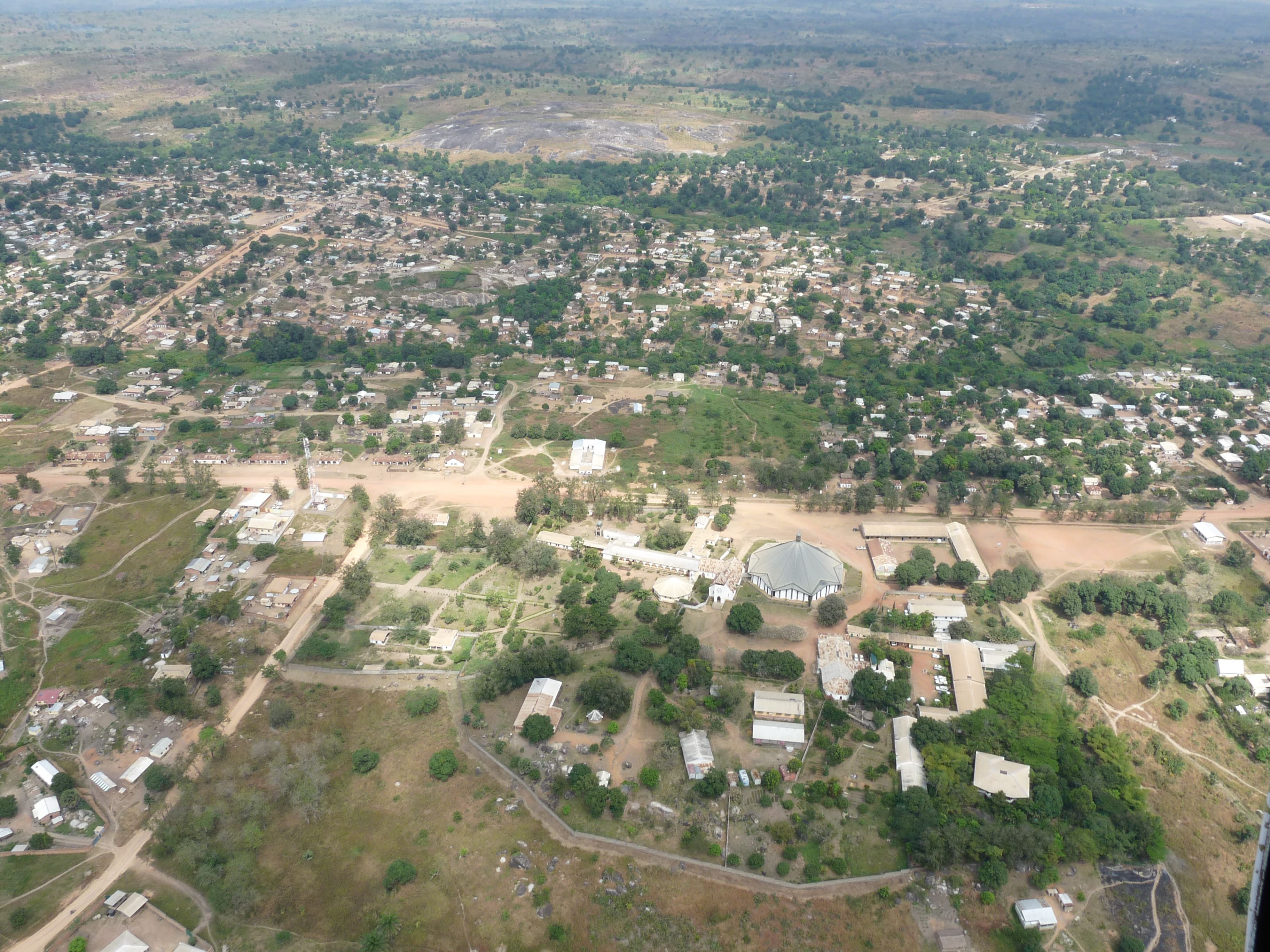 La ville de Bouar (Centrafrique) vue du ciel.